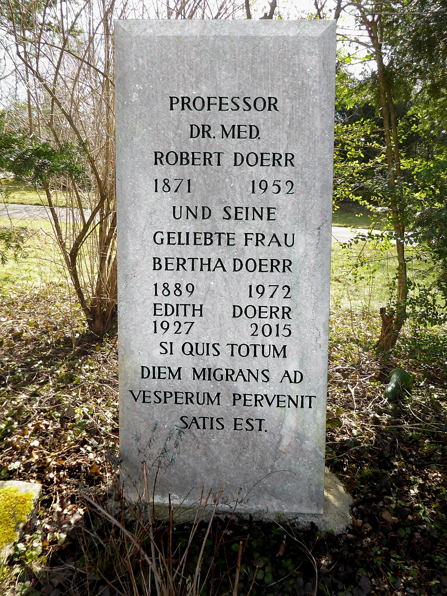 Robert Doerr (1871–1952) Dr.med. Professor für allg. und exper. Pathologie, Mikrobiologie, Immunologie, Verfasser von vielen Publikationen, Familiengrab auf dem Friedhof Hörnli, Riehen, Basel-Stadt